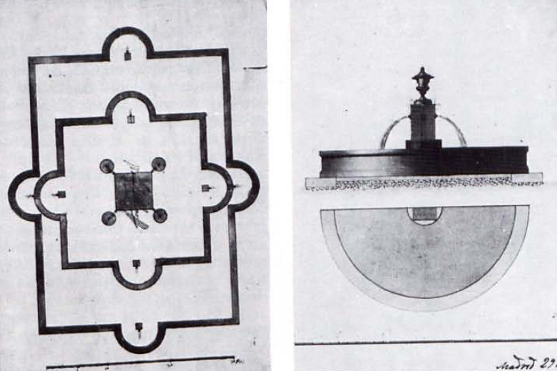 Proyectos de saneamiento y construcción de la Fuente de la Abundancia en la plaza de la Cebada de Madrid. Diseños de Manuel del Olmo (1677) y Pedro Ayegui (1840). Museo Municipal de Madrid.